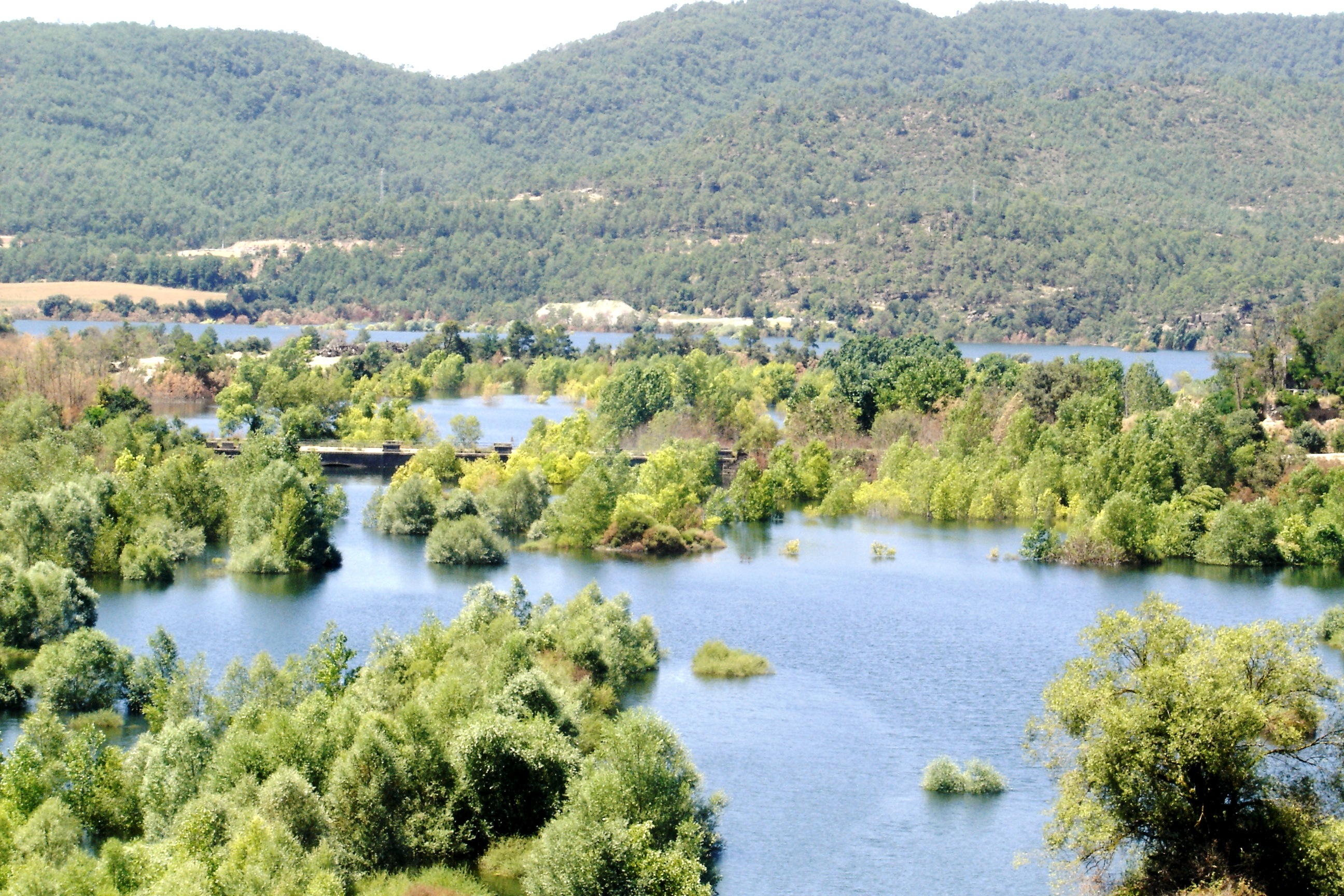 La Ribera Salada entrant al pantà de Rialb a Bassella.